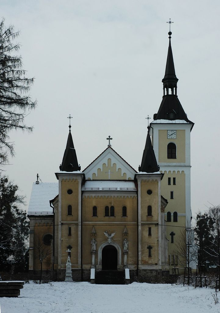 Římskokatolický kostel Nanebevzetí Panny Marie, Ostrava-Michálkovice